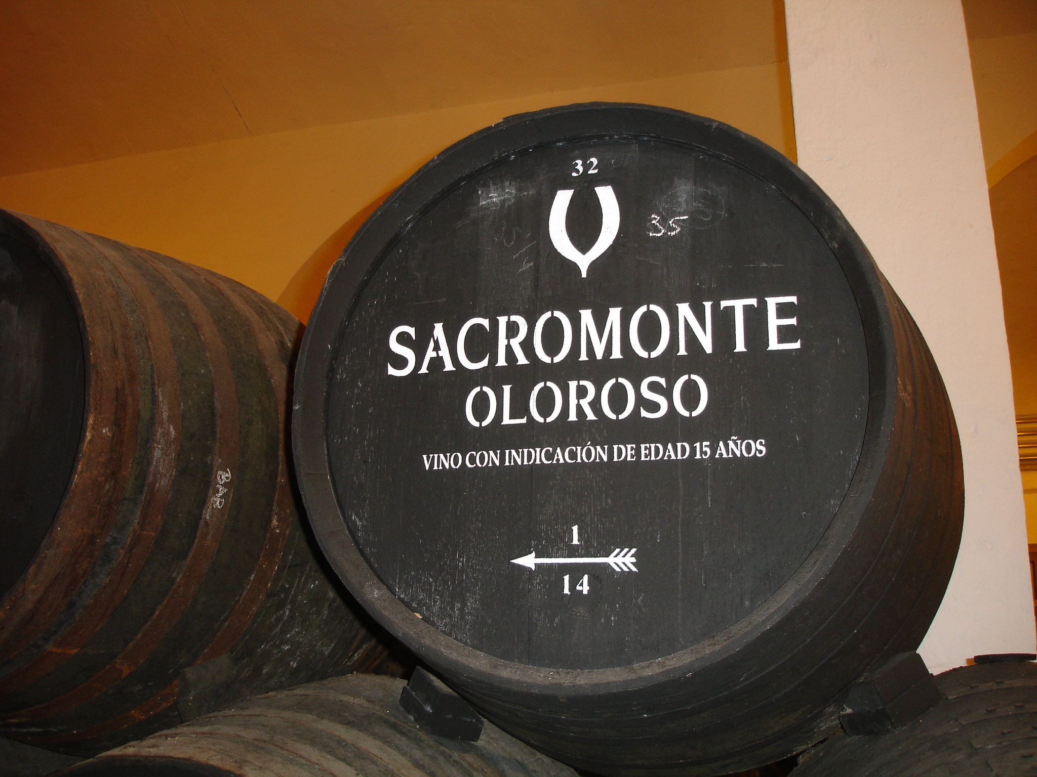 Valdivia in Jerez, Andalusia (Spain)